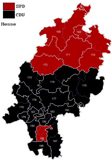 Districts de Hesse en 2009.